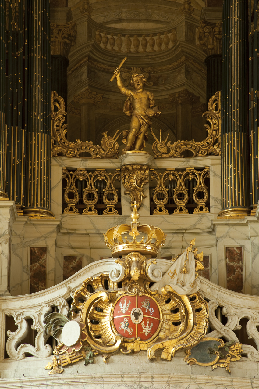 Tribune de l'orgue de Saint-Jacques de Lunéville (unique au monde : l'orgue est totalement caché par le décor rocaille), aux armoiries de Stanislas Leszczynski, roi de Pologne, grand-duc de Lituanie, duc de Lorraine et de Bar. .